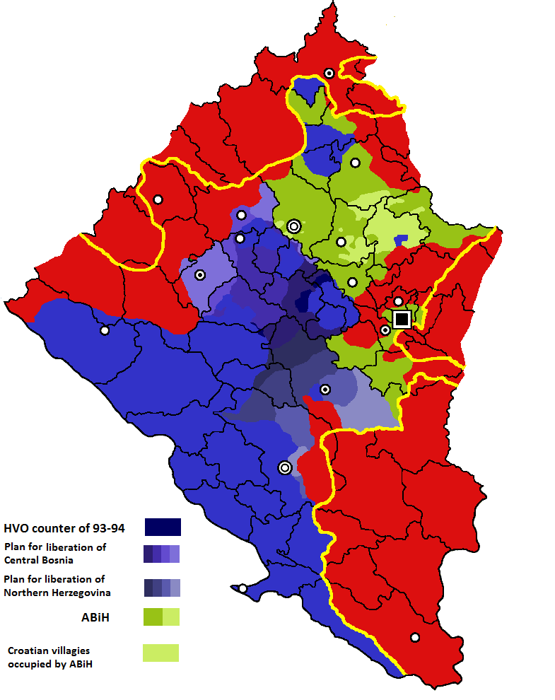 Planovi za oslobađanje središnje Bosne i sjeverne Hercegovine